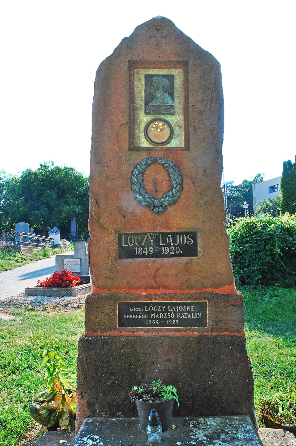 Lóczy Lajos (id.) sírja Balatonarácson. Csillag István alkotása (1922)